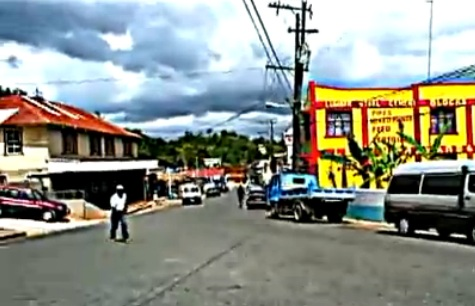 Straße in Claremont, Jamaika